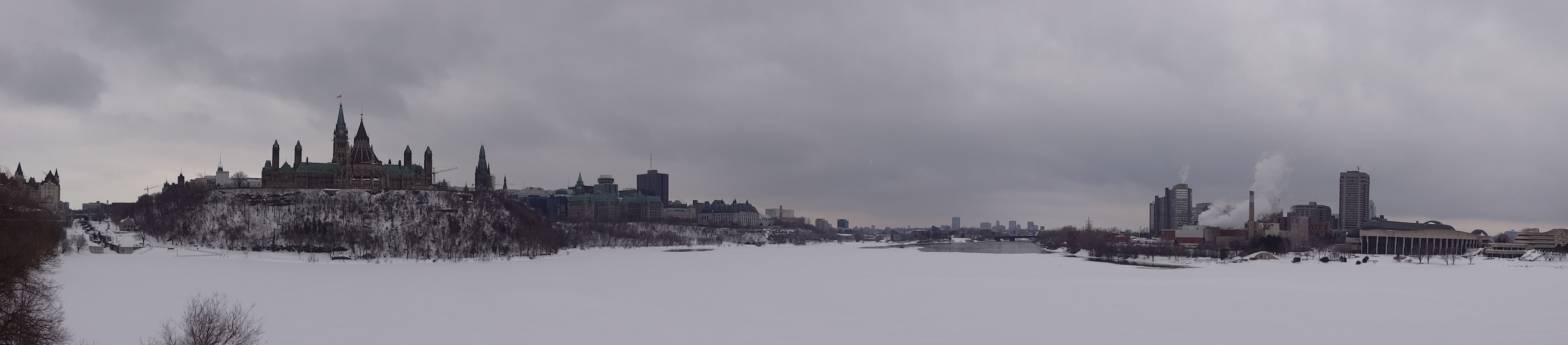 Rio Ottawa.